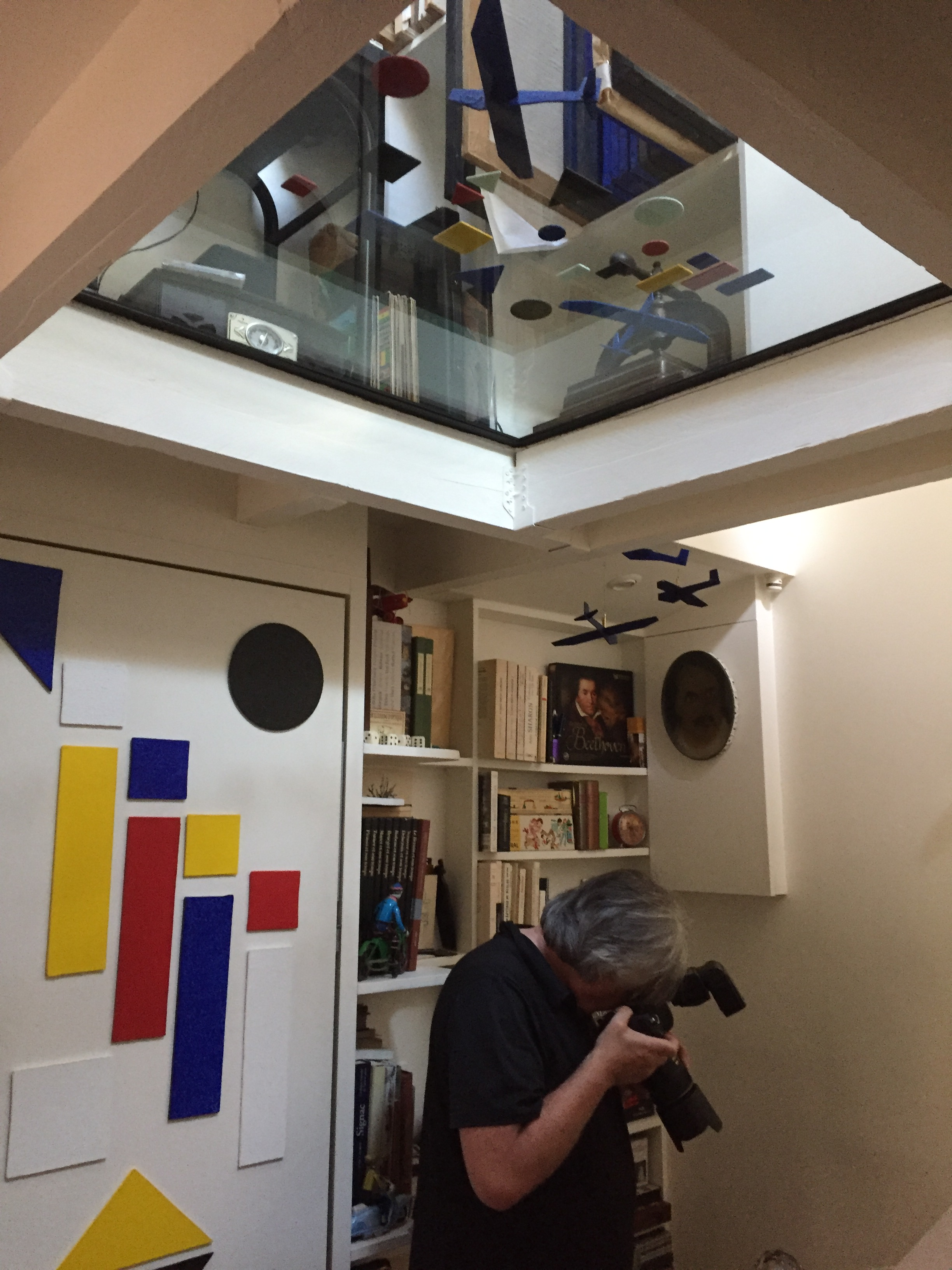 le photographe, Yves Sarrans, à l'atelier, photographié par l'artiste